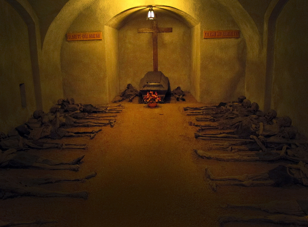 Nejstarší část kapucínské hrobky, pohřebiště bratří, r. 2016.